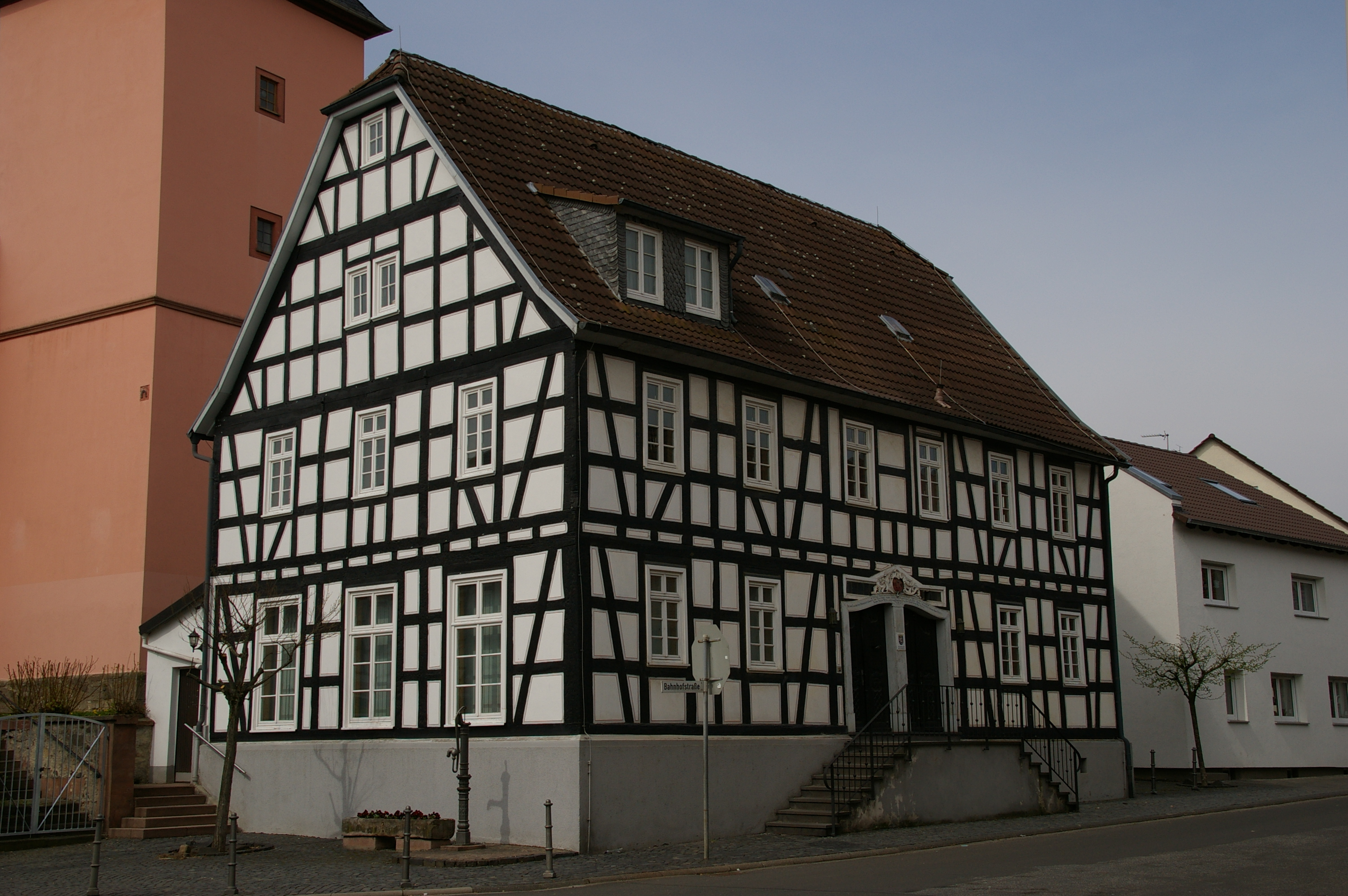 Das alte Rathaus Nieder-Wöllstdt, Bahnhofstrasse 2